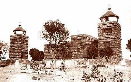 Enda Mariam nel 1930